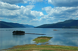 язовир Доспат, 2007 Пламен Ташев, България